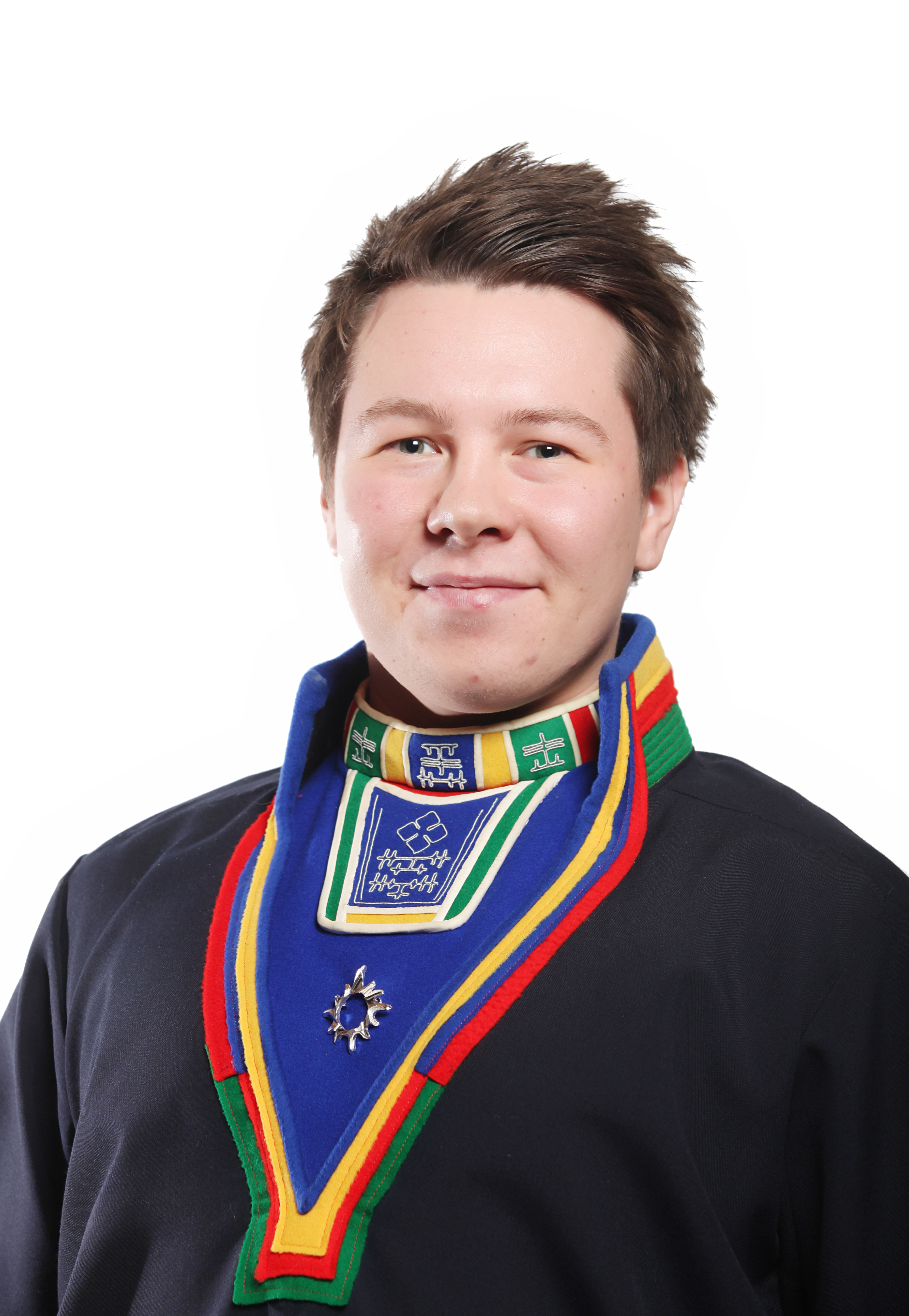 Nestleder for oppvekst-, omsorg- og utdanningskomitéen og medlem av valgkomitéen. Foto: Kenneth Hætta / Sametinget.